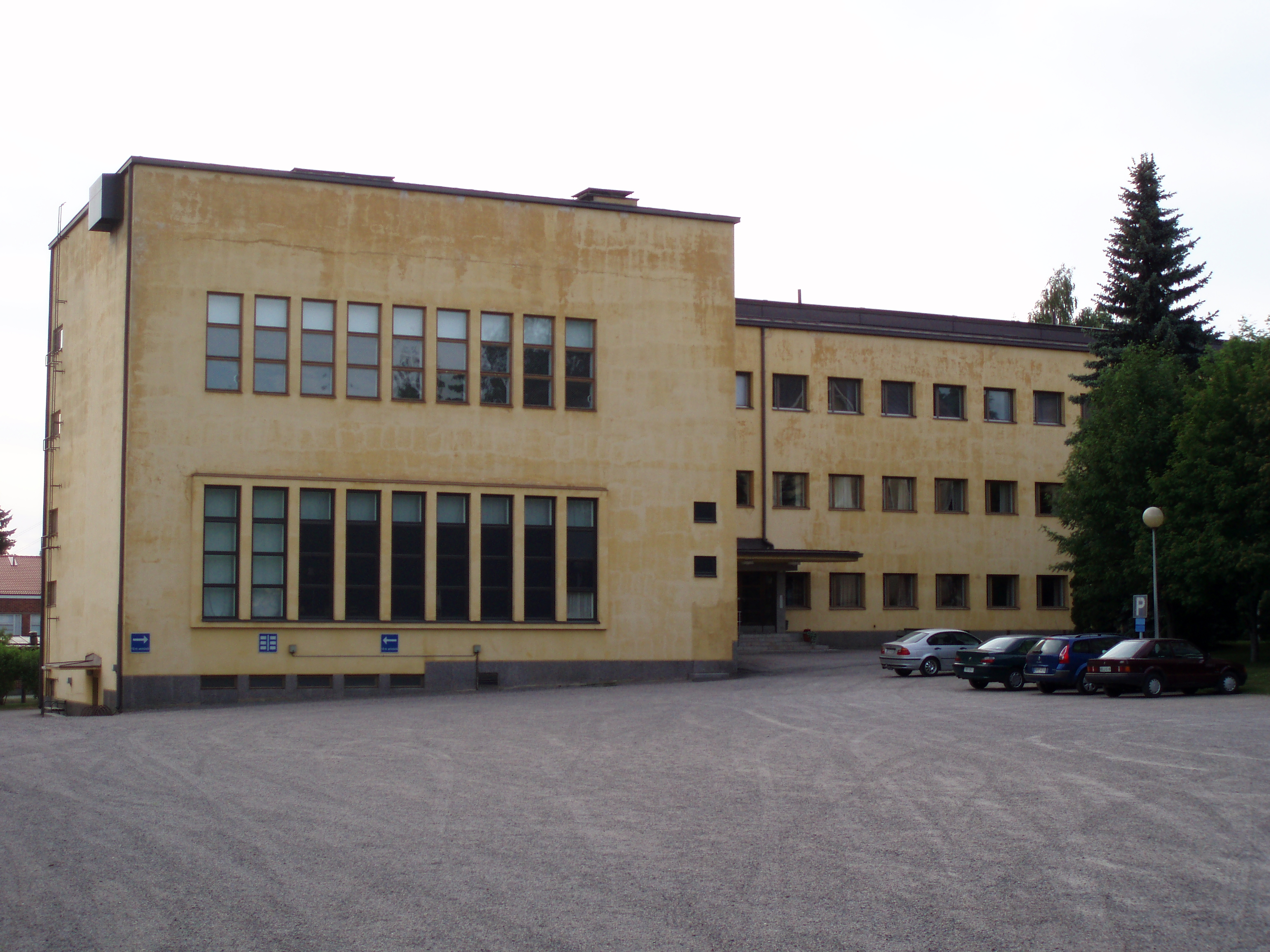 Opekon entinen päärakennus Heinolassa. Nykyisin Heinolan vanhasta seminaarin alueesta on tulossa 400–500 turvapaikanhakijan vastaanottokeskus.